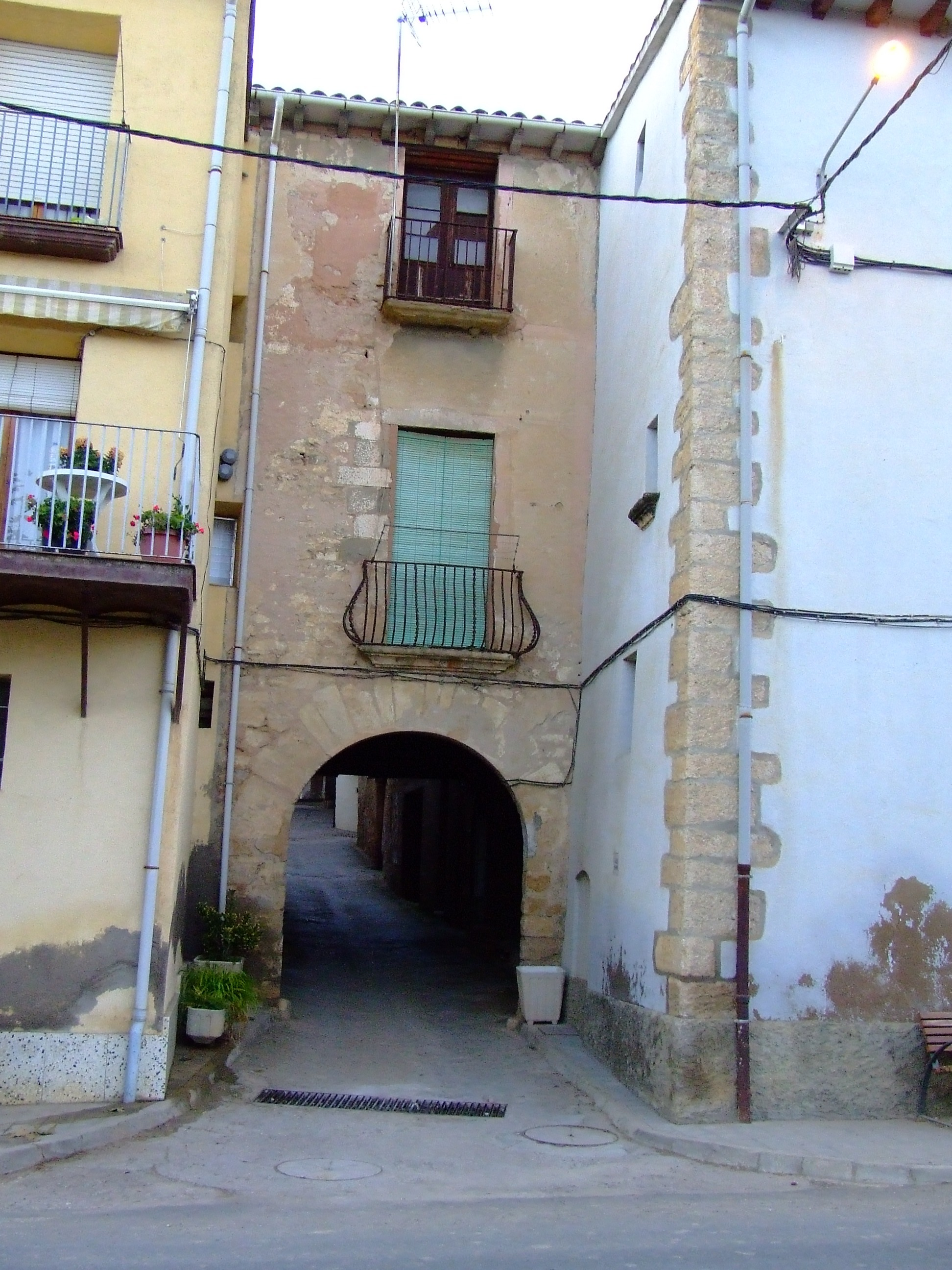 Portal de la Font, del clos murat de Conques (Isona i Conca Dellà)